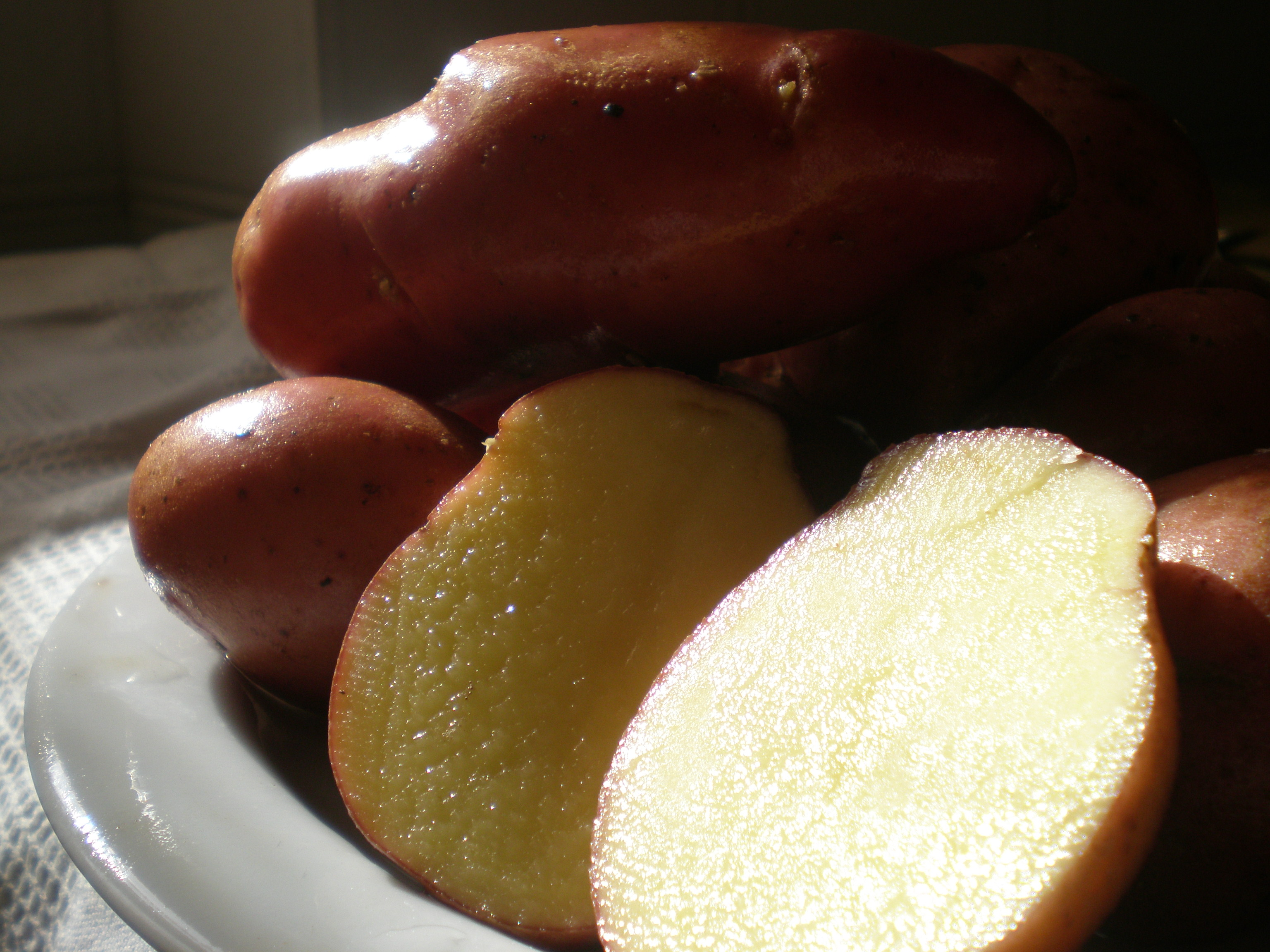 Patate rosse di Colfiorito